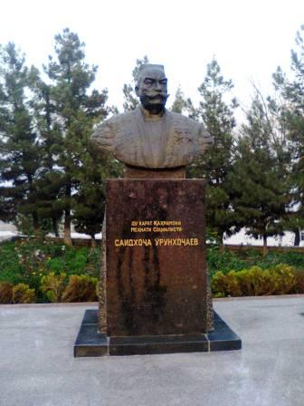 Памятник дважды Герою социалистического труда Саидходже Урунходжаеву в Гафуровском районе (Таджикистан)Тоҷикӣ: Ҳайкали Саидхоҷа Урунхоҷаев дар ноҳияи Ғафуров